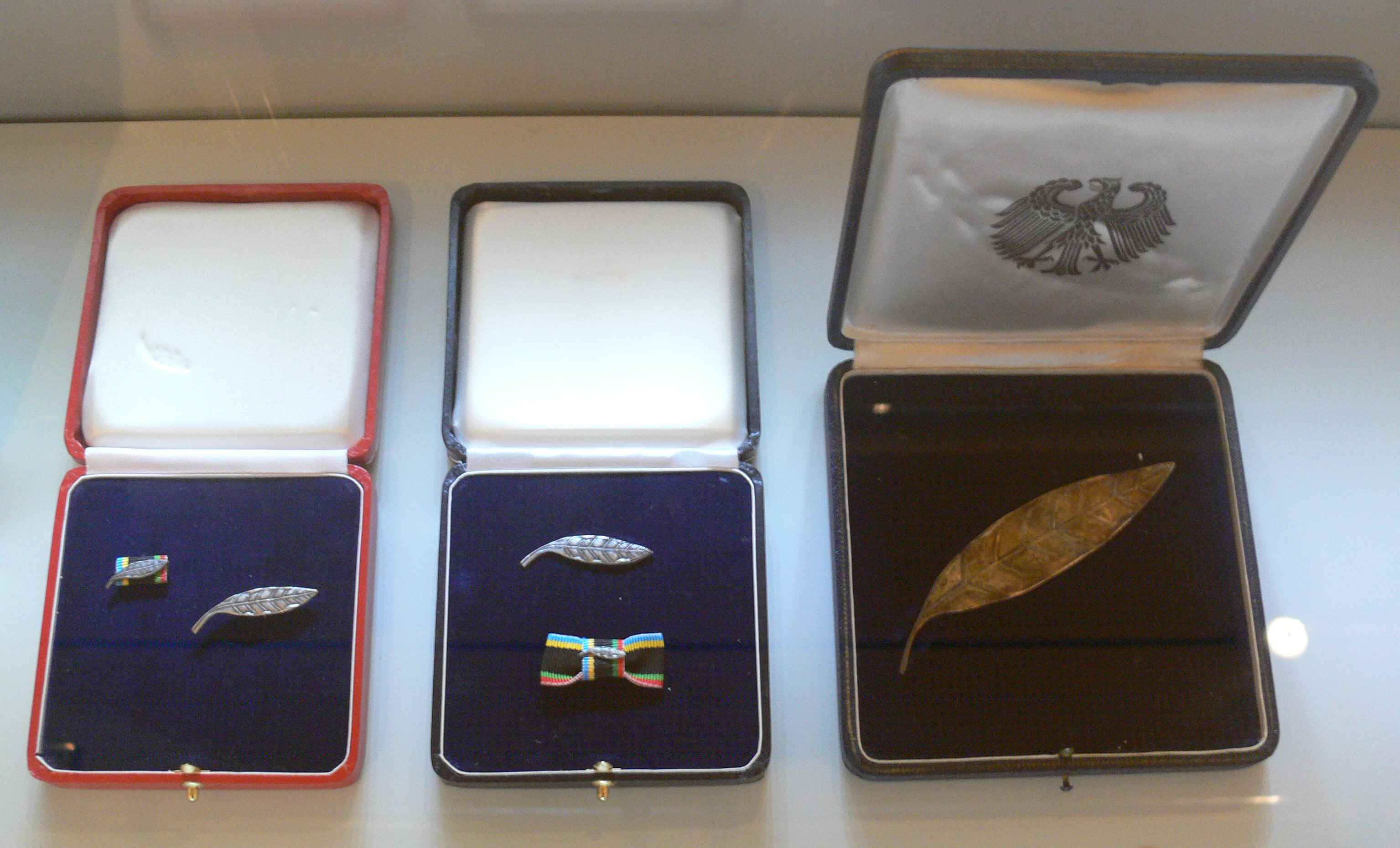 Silbernes Lorbeerblatt (verschiedene Ausführungen: Einzelausführung, Mannschaftsausführung, Miniaturausführungen für Damen und Herren)